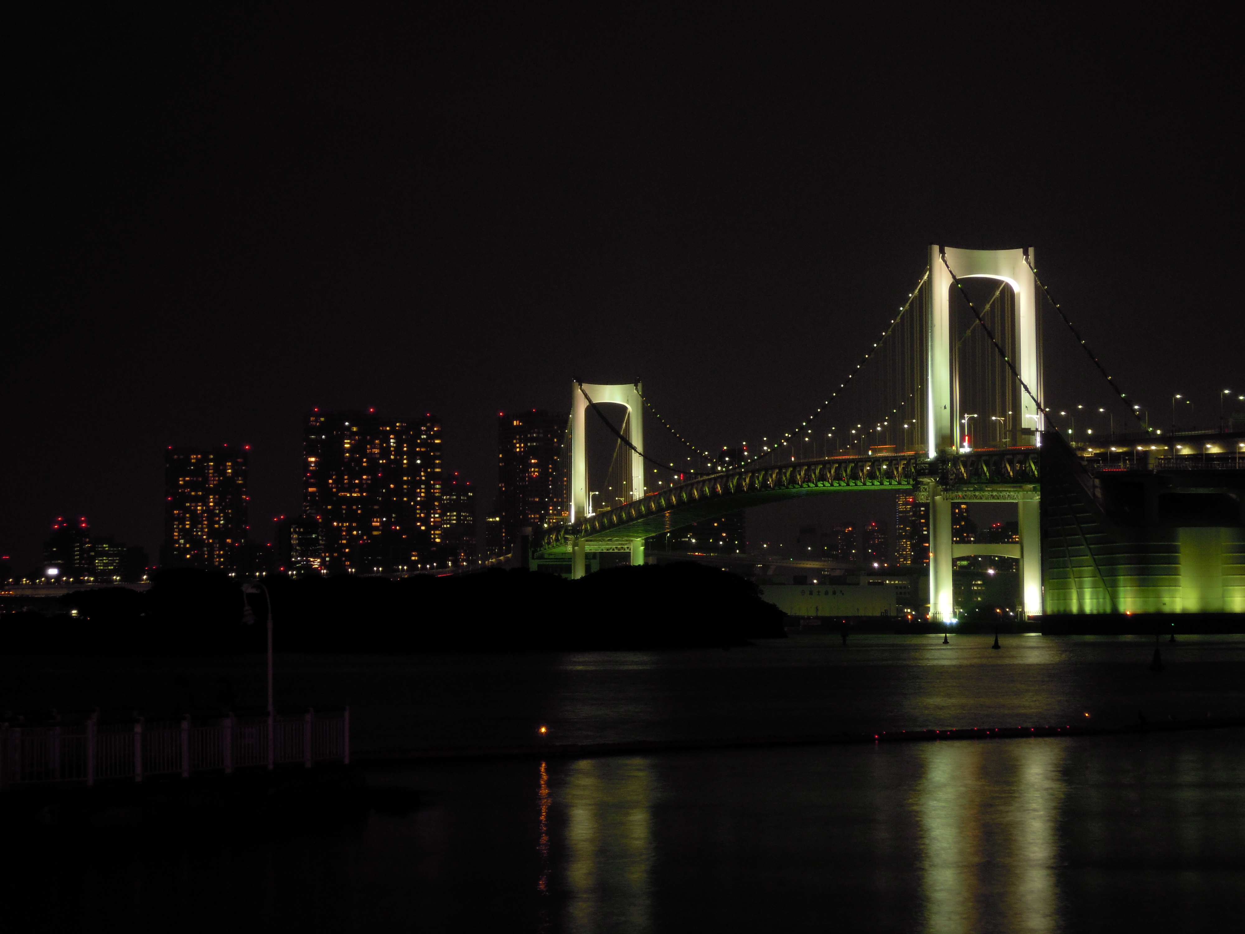 夜のレインボーブリッジ